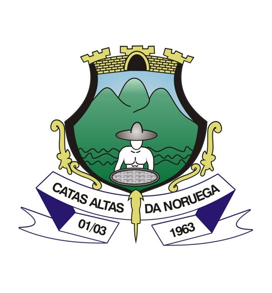 Brasão de Armas domunicípio de Catas Altas da Noruega, Minas Gerais, Brasil.